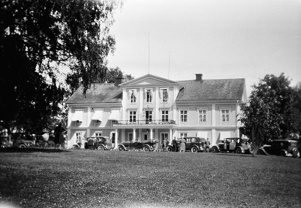 Rottneros manor in Sunne, with cars parked in front. The manor (destroyed by fire in December 1929 and rebuilt) was model for Ekeby in "Gösta Berling's Saga" by Swedish Nobel Laureate Selma Lagerlöf. Rottneros herrgård i Sunne, med bilar parkerade framför. Herrgården (som brann ner i december 1929 och återuppbyggdes) var modell för Ekeby i "Gösta Berlings saga" av Nobelpristagaren Selma Lagerlöf. Parish (socken): Sunne Province (landskap): Värmland Municipality (kommun): Sunne County (län): Värmland Photograph by: Berit Wallenberg Date: 13.07.1929 Format: Film Persistent URL: Read more about the photo database (in english)